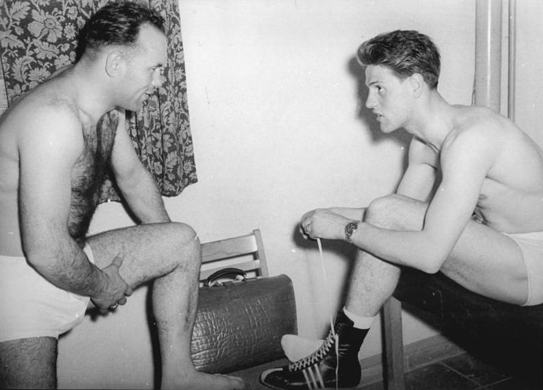 Nitzschke, Stubnick Zentralbild Funck 30.4.1955 Boxländerkampf Österreich-DDR in Berlin. In der Berliner Werner-Seelenbinder-Halle fand am 29.4.1955 der Box-Länderkampf zwischen Österreich und der DDR statt. Die Österreicher enttäuschten etwas und bildeten kurz vor den Europameisterschaften nicht den erwarteten harten Prüfstein. Sie unterlagen mit 19:1. UBz: Ulli Nitzschke (Halle) und Erich Stubnick (Berlin) ziehen sich zum Kampf um.